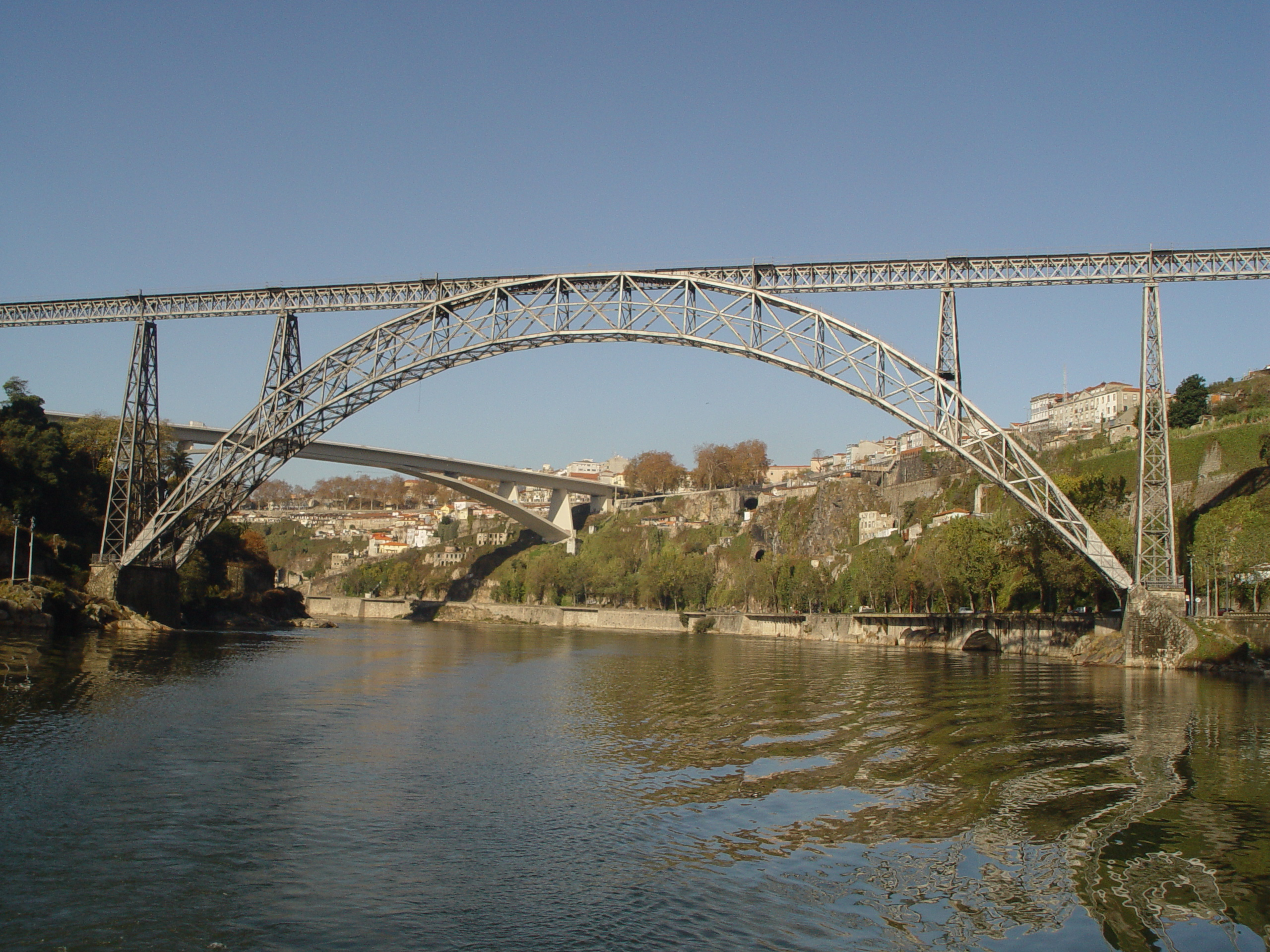 Maria Pia Bridge in Porto, Portugal